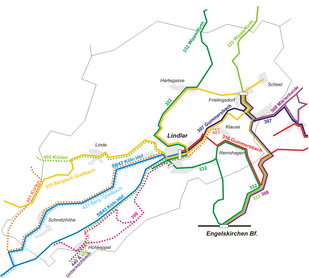 Linien- und Schulbusverkehr in Lindlar. Gestrichelte Linien verkehren nur an Schultagen (398, 401, 402, 440). Die Linie 421 verkehrt nur an Schultagen bis Lindlar (regulärer Linienverkehr bis Immekeppel). Weitere Informationen im Artikel Lindlar.